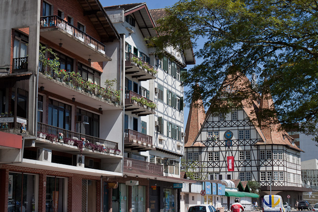 Construções em Enxaimel vistas da Avenida Pres. Castelo Branco (Beira Rio). Ao fundo o Castelinho da Moellman,um dos cartões postais da cidade.